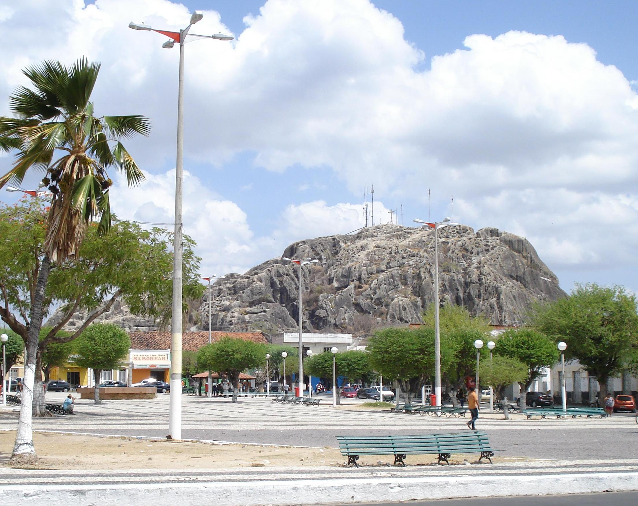 Vista da Pedra do cruzeiro a partir da Praça José de Barros, Quixadá, Ceará, Brasil.